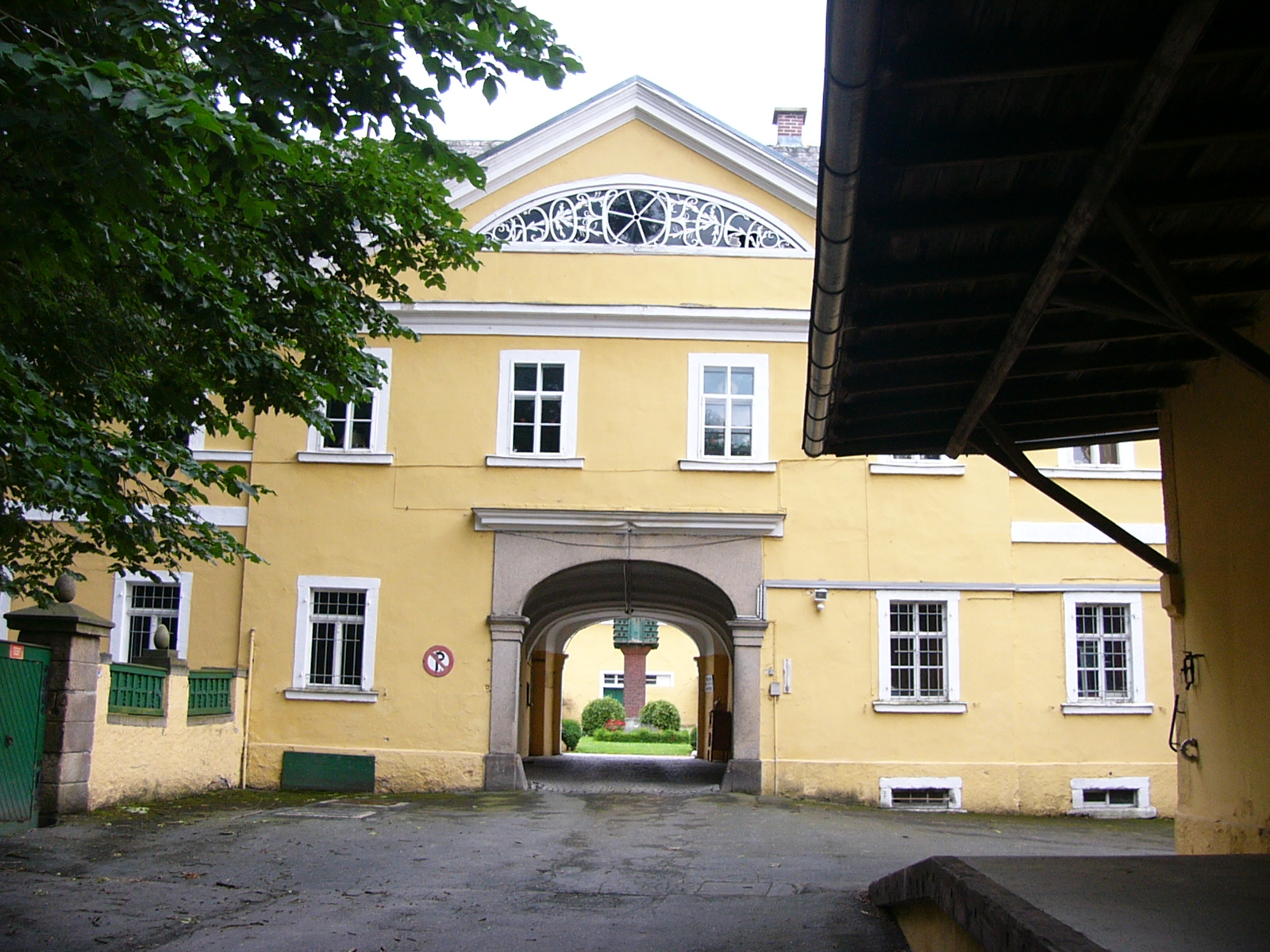 Schloßbrauerei Gottsmannsgrün, Eingangsportal